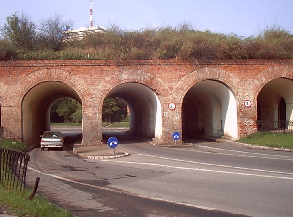 Bastion Timisoara.